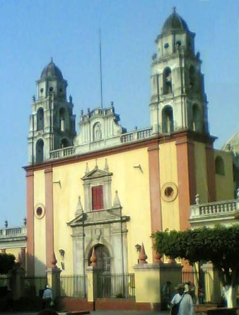 Ex convento de Santo Domingo de Guzmán en la ciudad de Cuautla, Morelos.